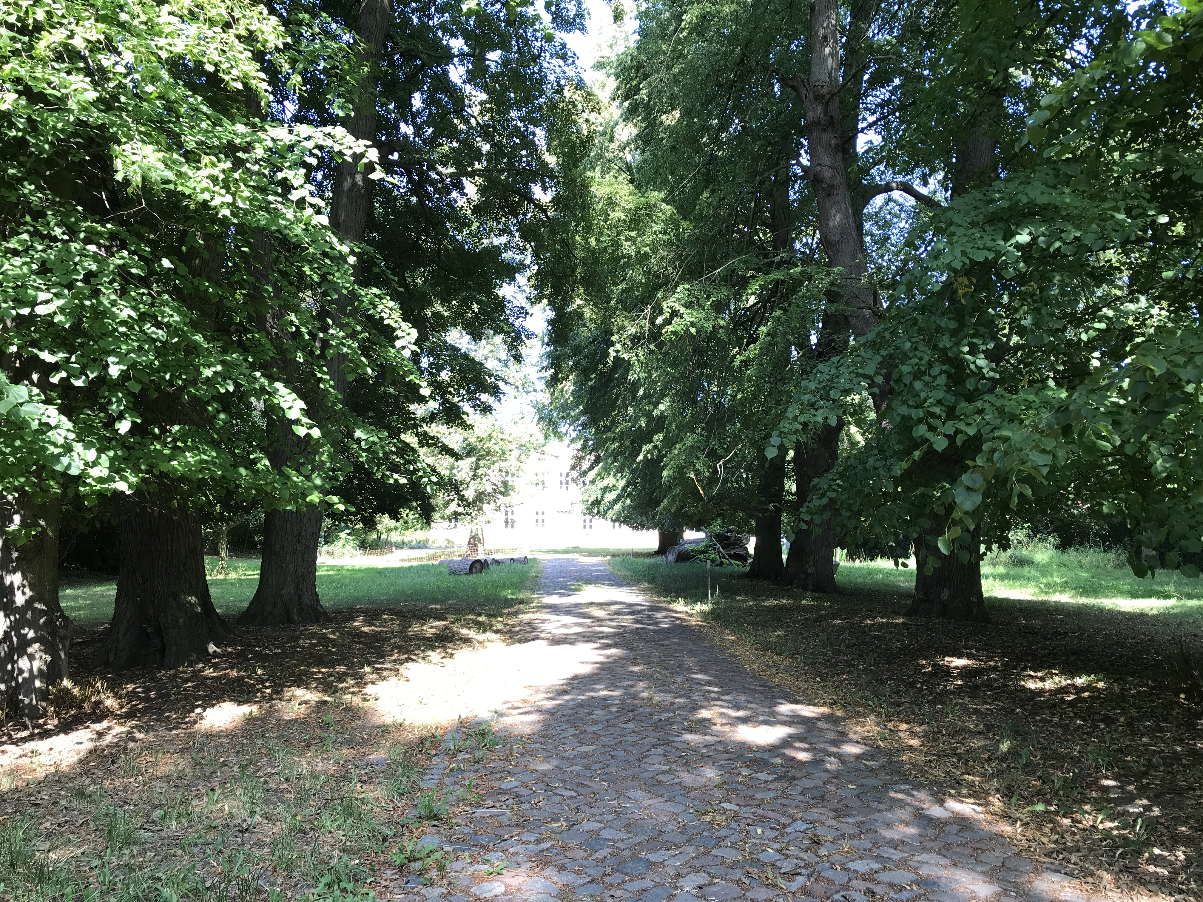 Das Gutshaus in Wehrland der Gemeinde Zemitz in Mecklenburg-Vorpommern ist ein Herrenhaus aus den Jahren 1837 und 1838.